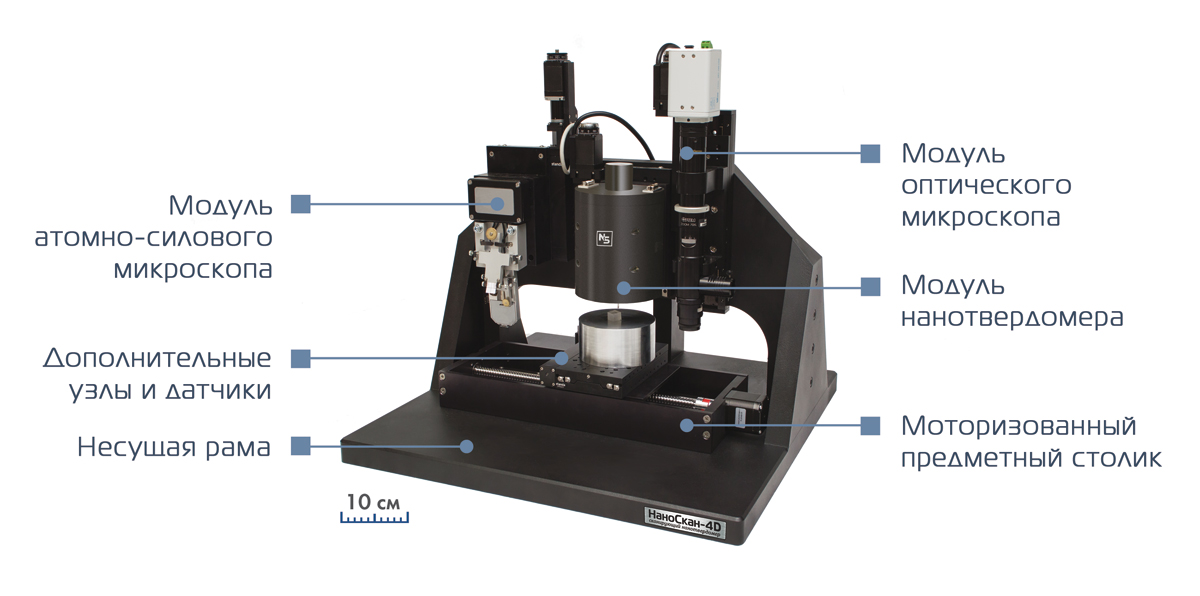 Устройство сканирующего нанотвердомера "НаноСкан-4D"